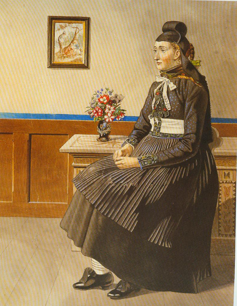 Hinterländer Tracht aus Bottenhorn Obergericht ehm. Amt Blankenstein